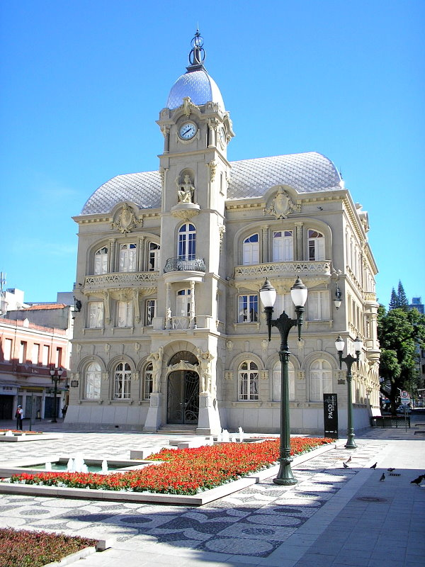 Paço da Liberdade na Praça Generoso Marques em Curitiba, Paraná, Sul do Brasil.